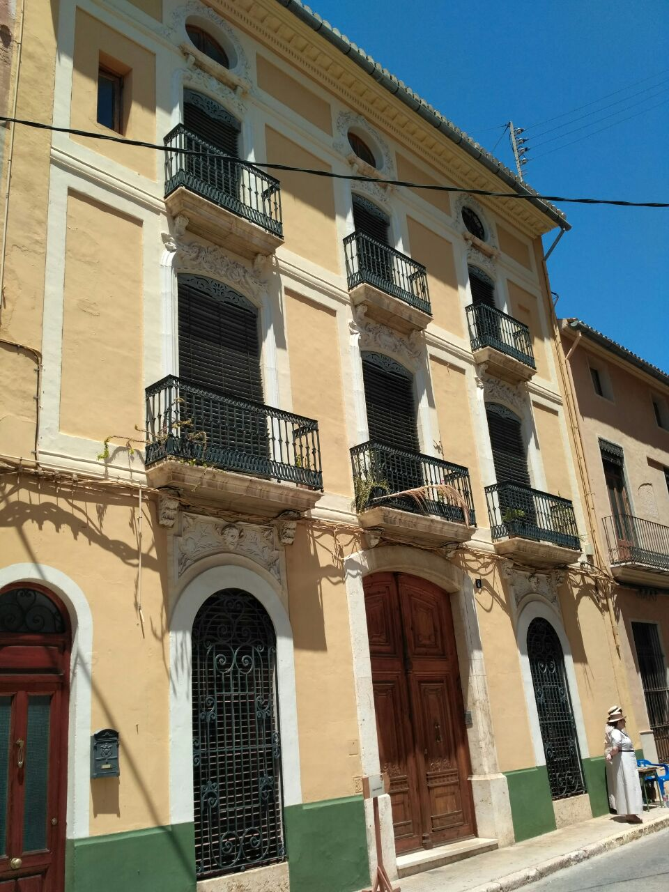 Exterior e interior de la casa modernista de los Vernich, calle de Sant Llorenç número 8, Carcaixent (Valencia).